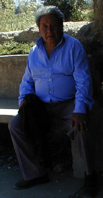 Hugo Orellena